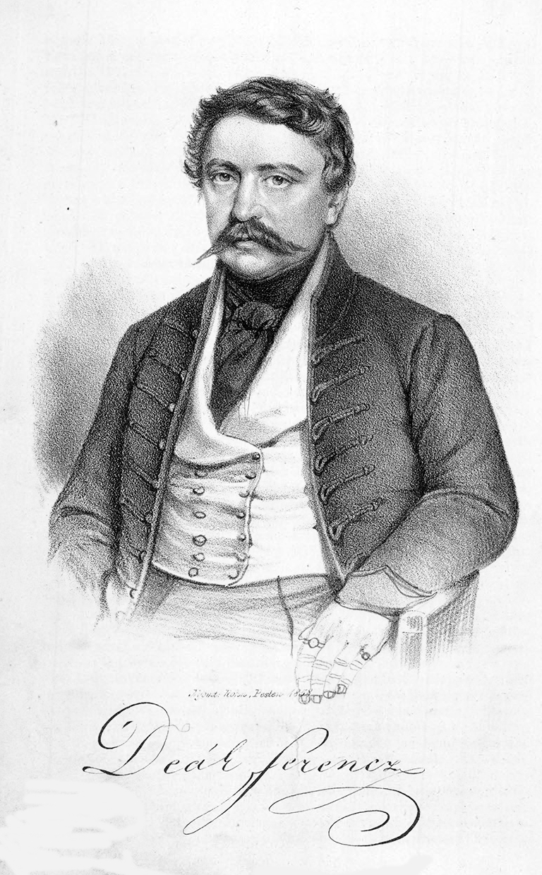 Kehidai Deák Ferenc (Született: Deák Ferenc Antal,[1] Söjtör, 1803. október 17. – Budapest, 1876. január 28.) magyar politikus, jogász, táblabíró, államférfi, országgyűlési képviselő, igazságügy-miniszter. A reformkorban és a dualizmusban is meghatározó államférfit, „a haza bölcse” és „a nemzet prókátora” titulussal illették.